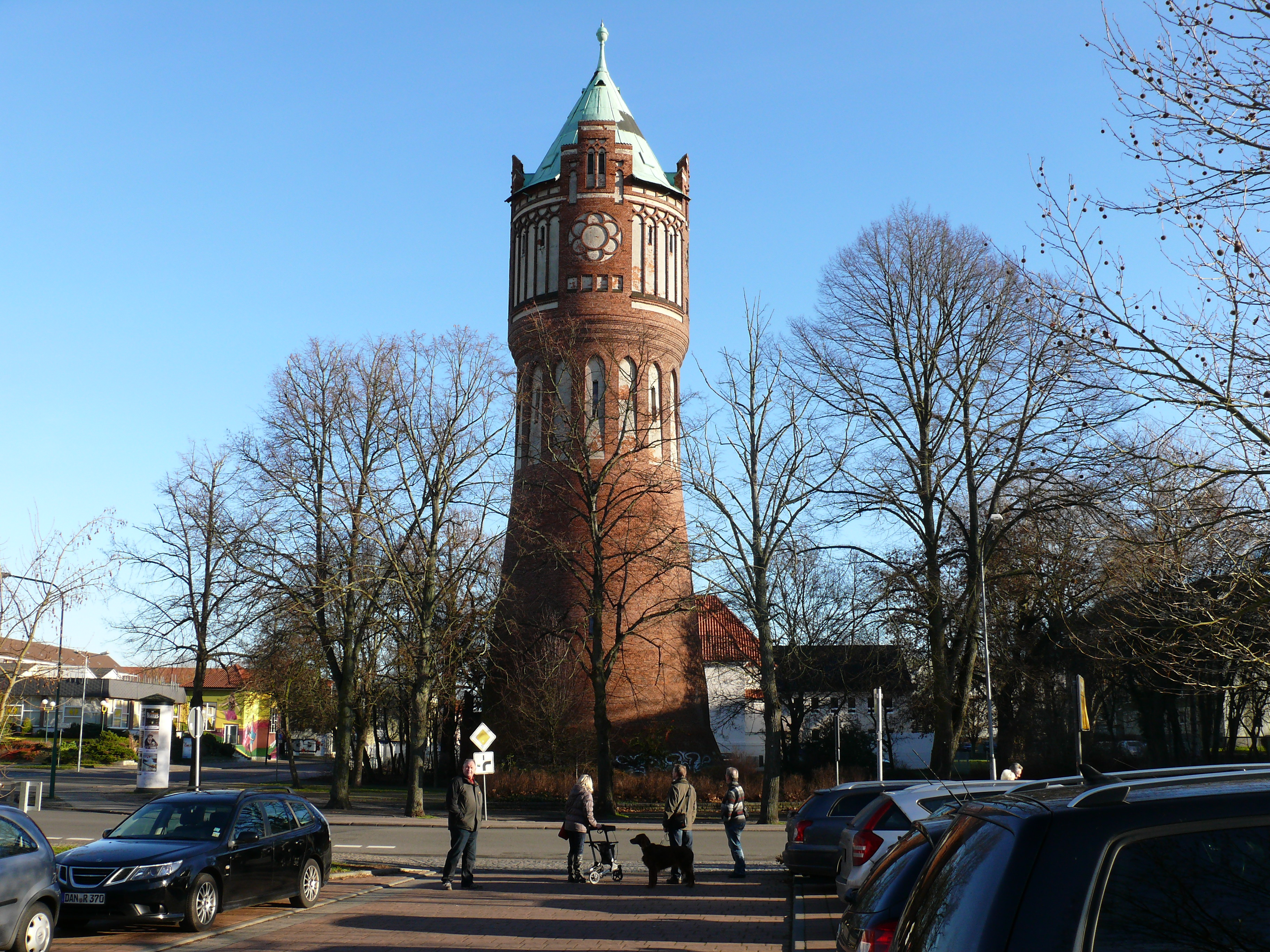 Der Neugotische Wasserturm in der Hansestadt Salzwedel.